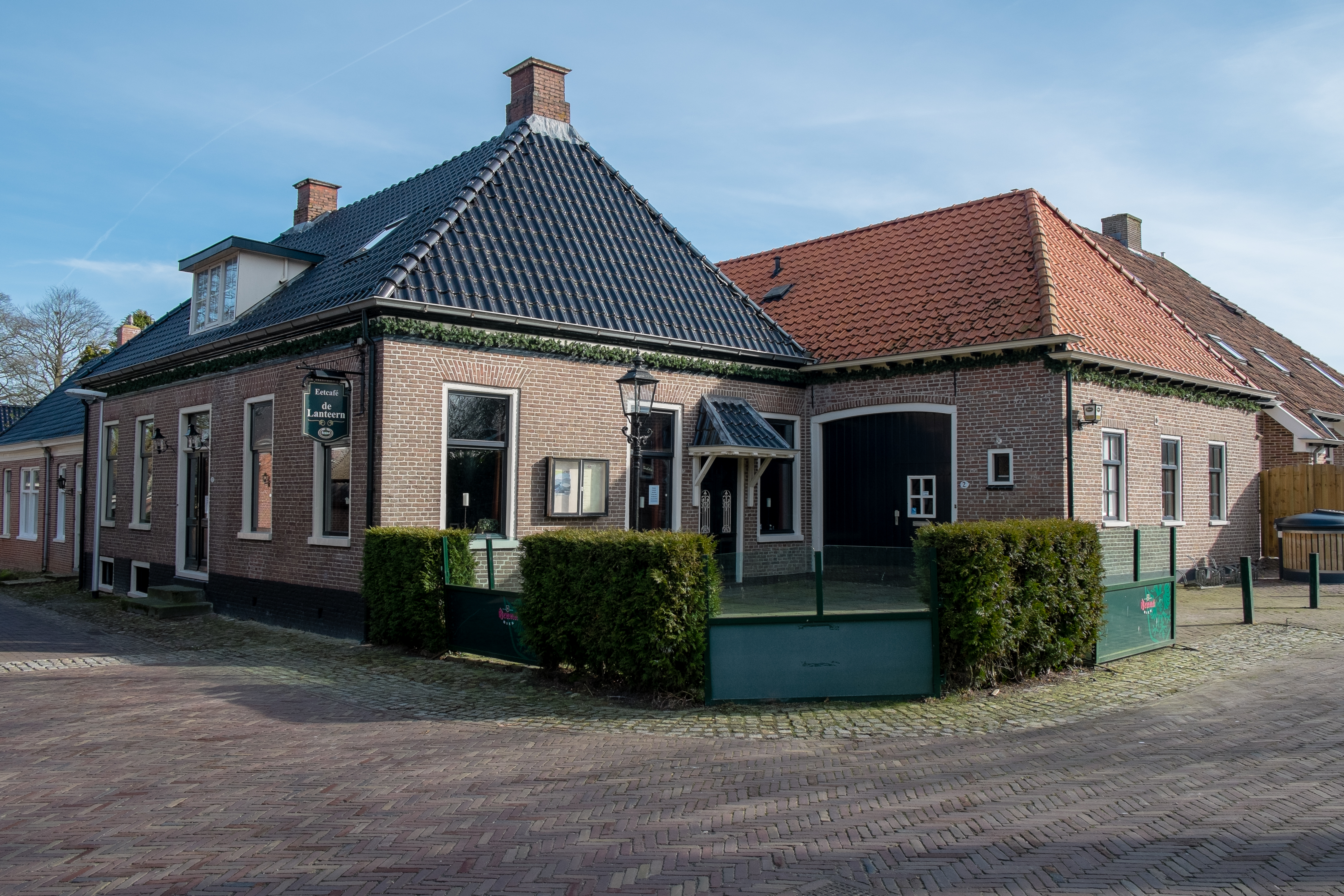 Restaurant De Lanteern aan de Kerkstraat 12 in Noordlaren